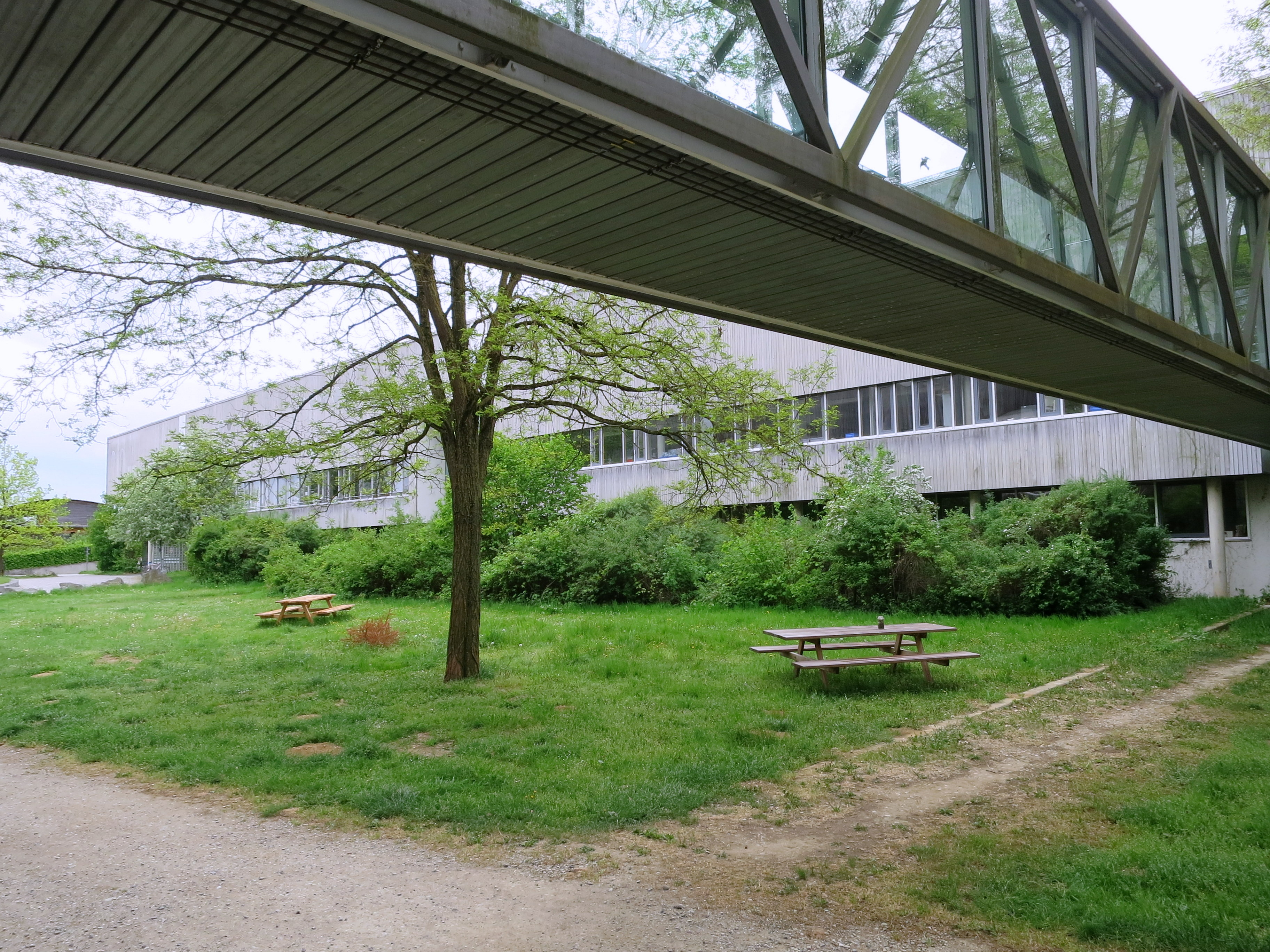 LWF-Gebäude mit Brücke